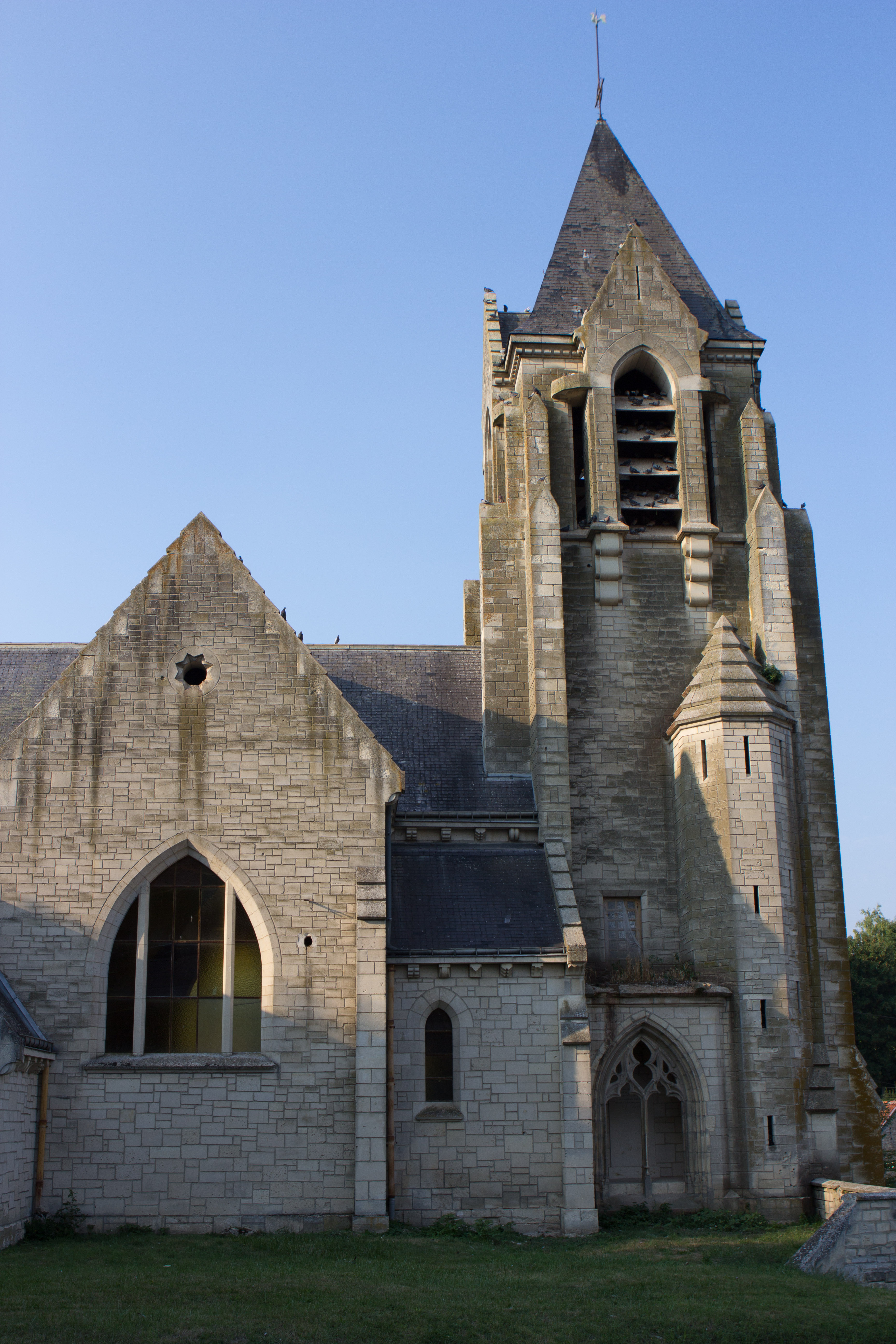 Église Sainte-Benoite de Craonnelle / Craonnelle, Aisne, France